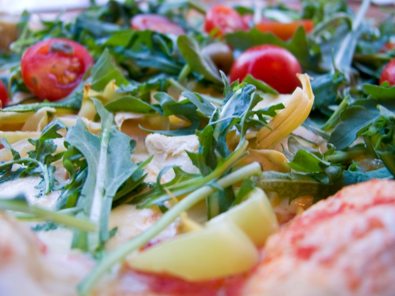 Vegetarijanska pizza s rigom (Eruca sativa).